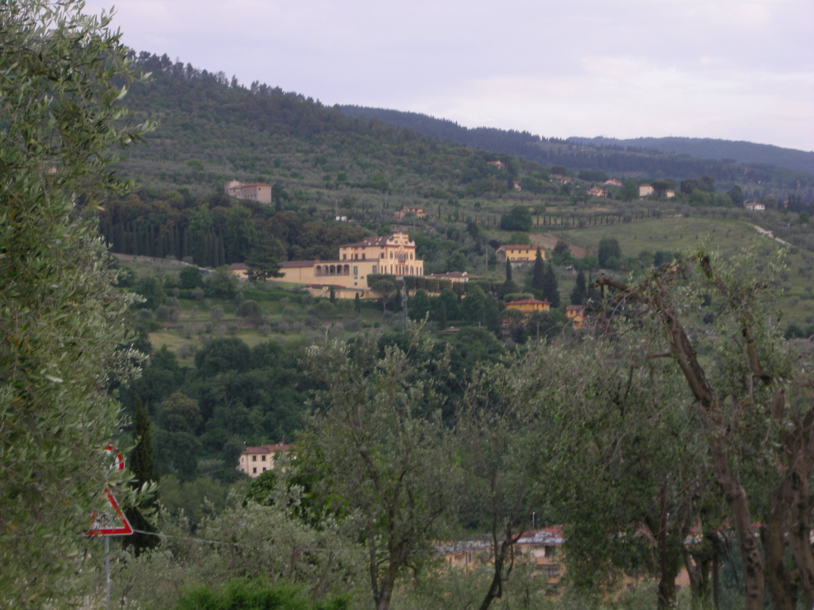 Villa la tana, veduta dal girone